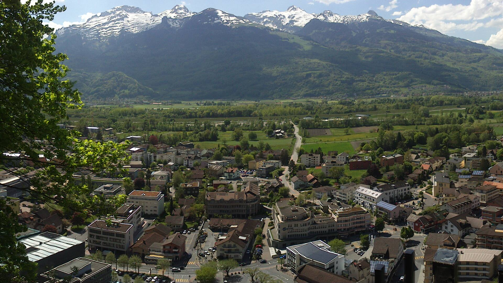 Vaduz, Liechtenstein. Schweize Gebirge im Hintergrund